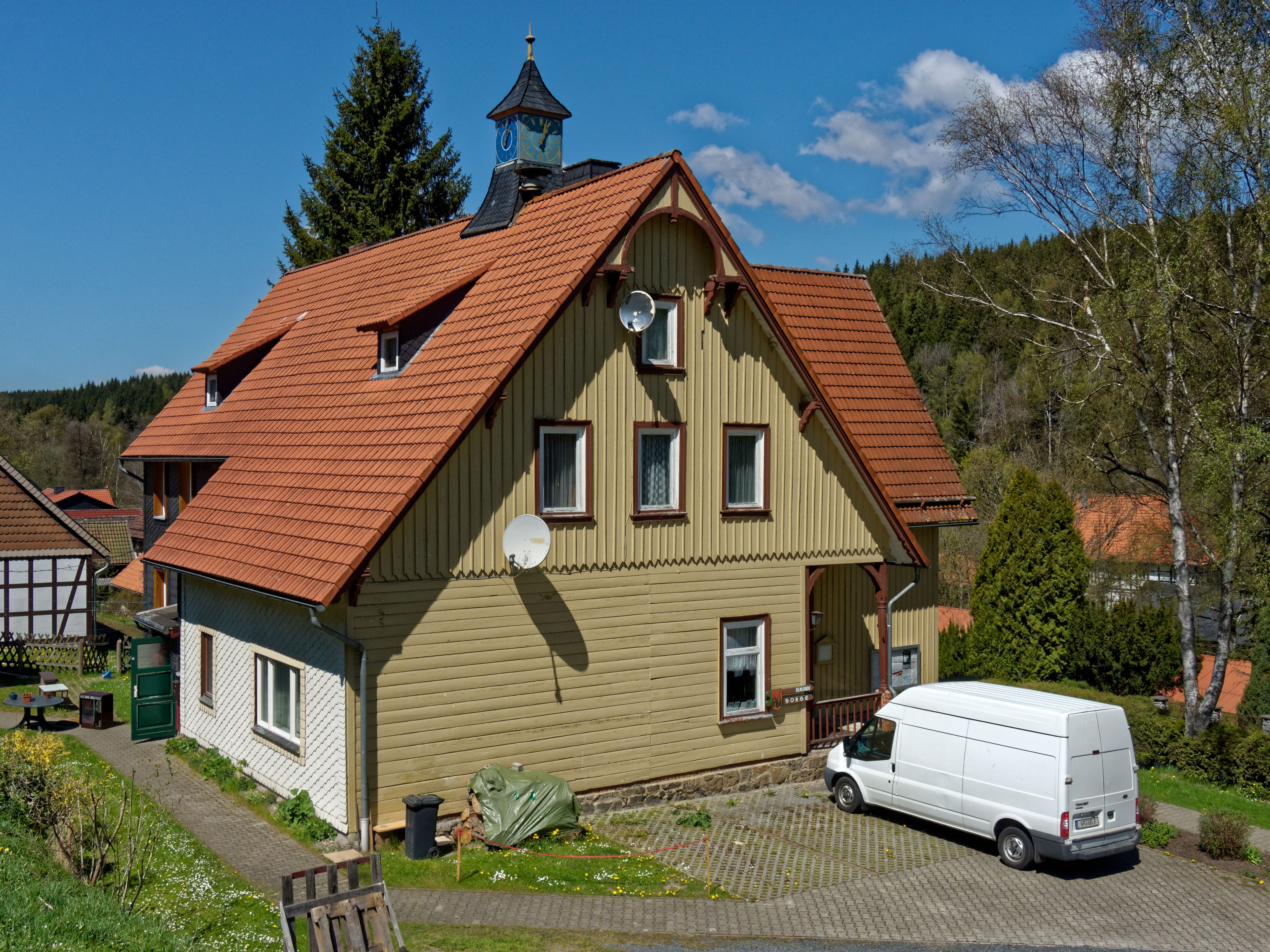 Ehemaliges Rathaus von Sorge im Harz